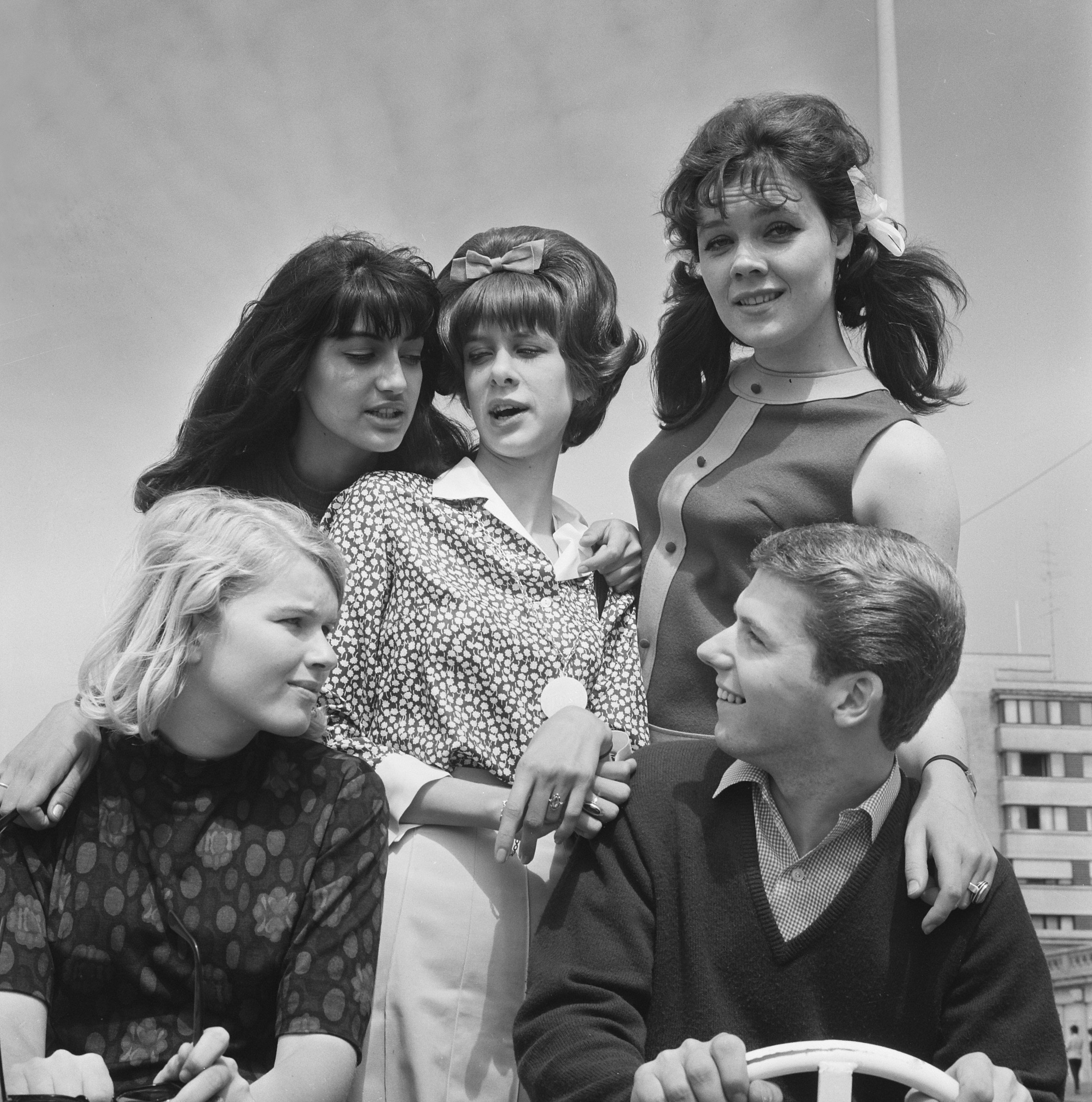 Songfestival van Knokke, de Nederlandse ploeg; voor Martine Bijl, Ronnie Tober, achter v.l.n.r. Margie Ball, Janneke Peper en Karin Kent. 9 juli 1966